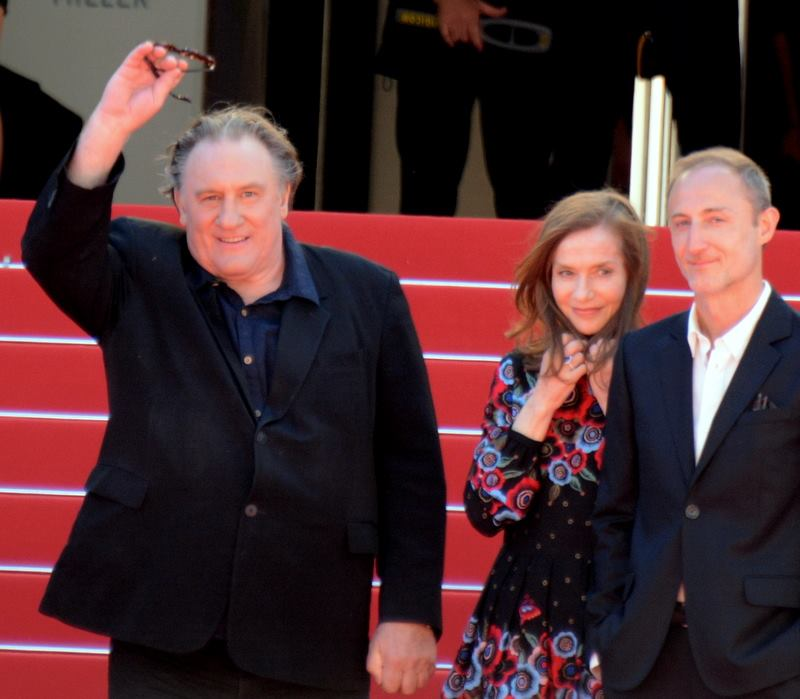 Gérard Depardieu, Isabelle Huppert et Guillaume Nicloux lors de la présentation de "Valley of love" au festival de Cannes